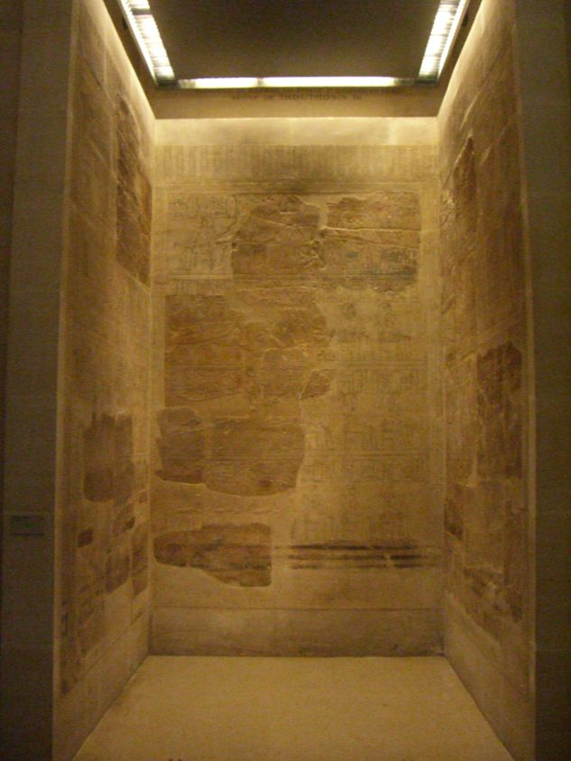 La "Chapelle des ancêtres" provenant du temple d'Amon-Rê de Karnak - Règne de Thoutmosis III - XVIIIe dyanstie égyptienne - Grès. H. : 3,60 m. ; L. : 2,47 m. ; Pr. : 2,65 m. - Musée du Louvre